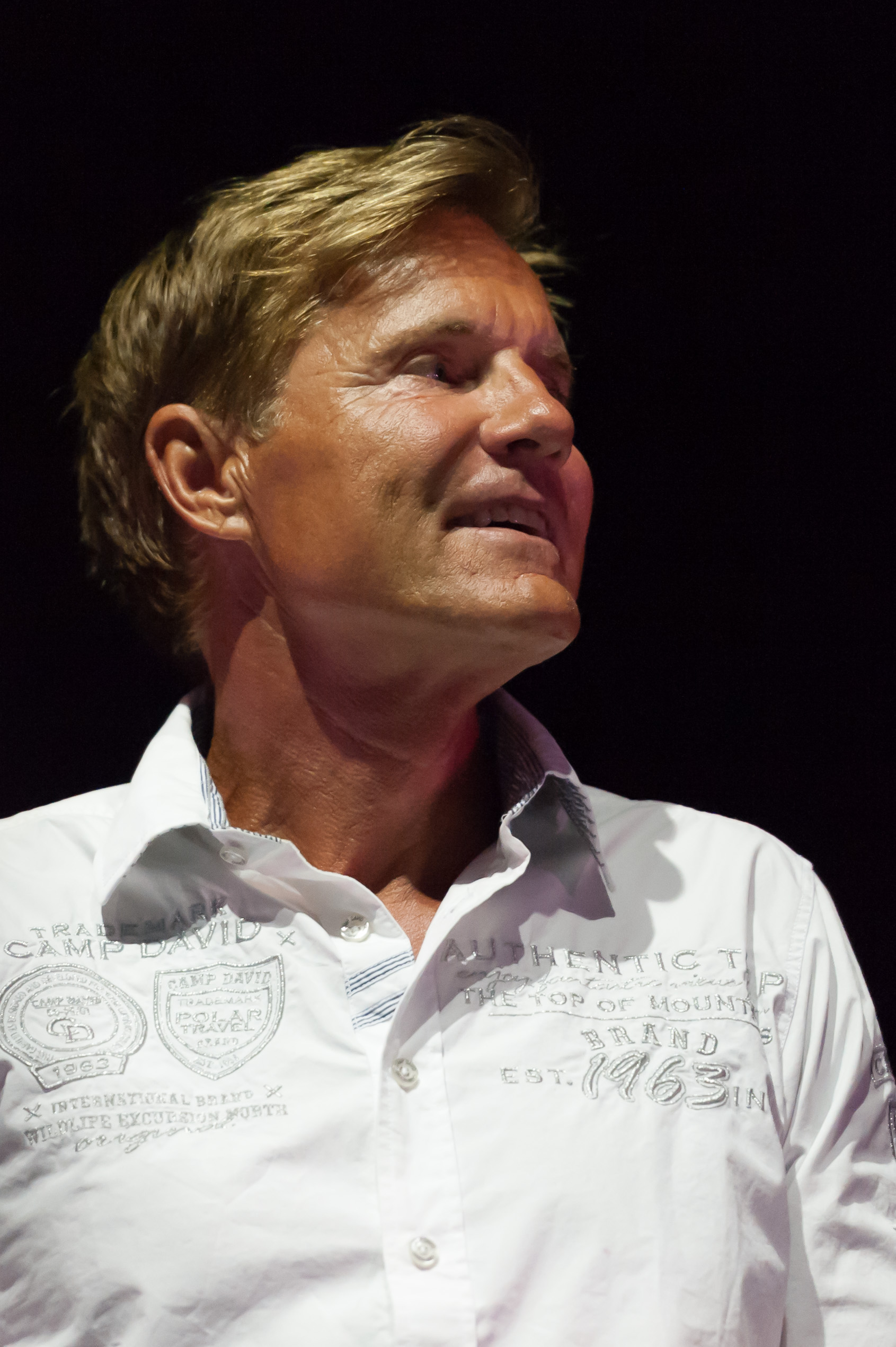 DSDS - Live on Tour 27. Juli 2014, Stadthalle Wien Dieter Bohlen